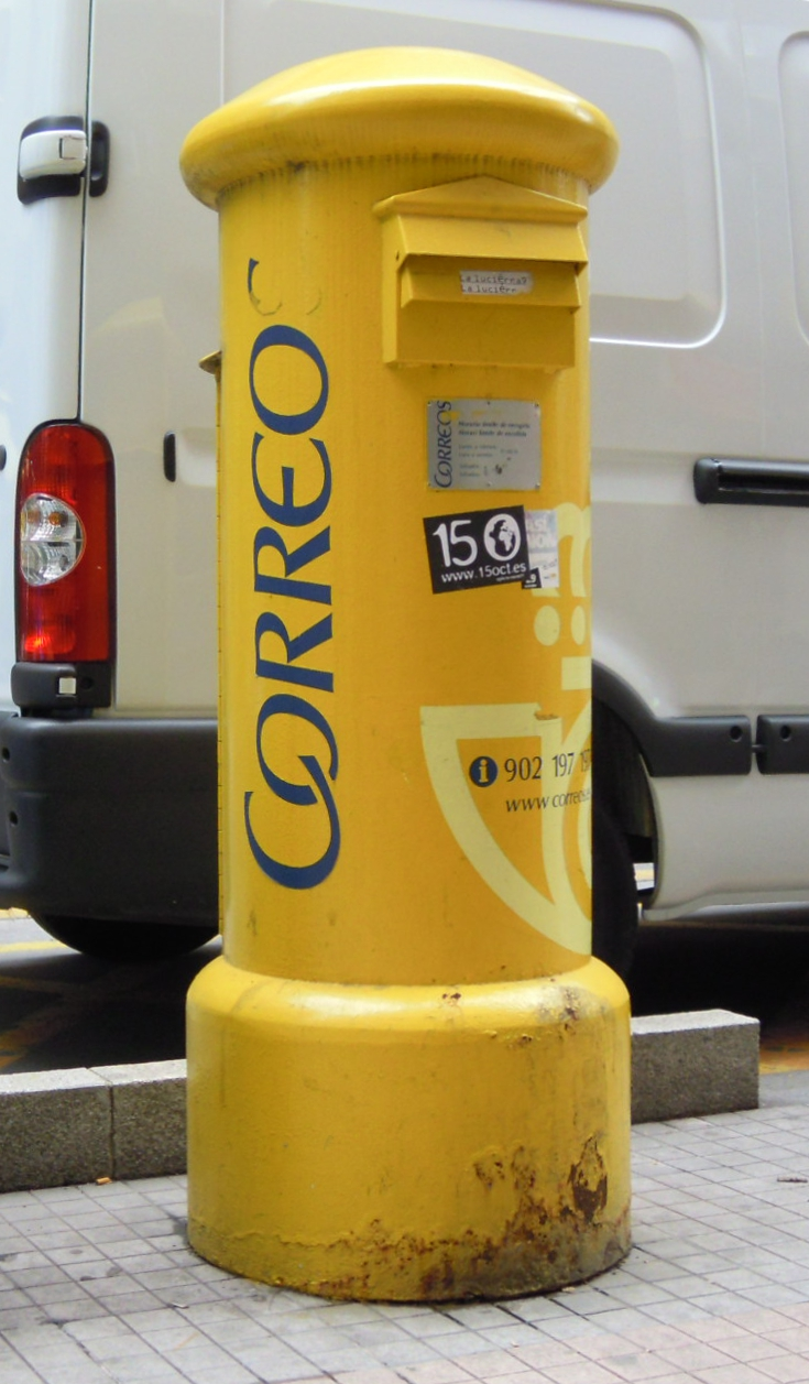 Caixa do correo do servizo de Correos na rúa de Sagasta de Pontevedra.